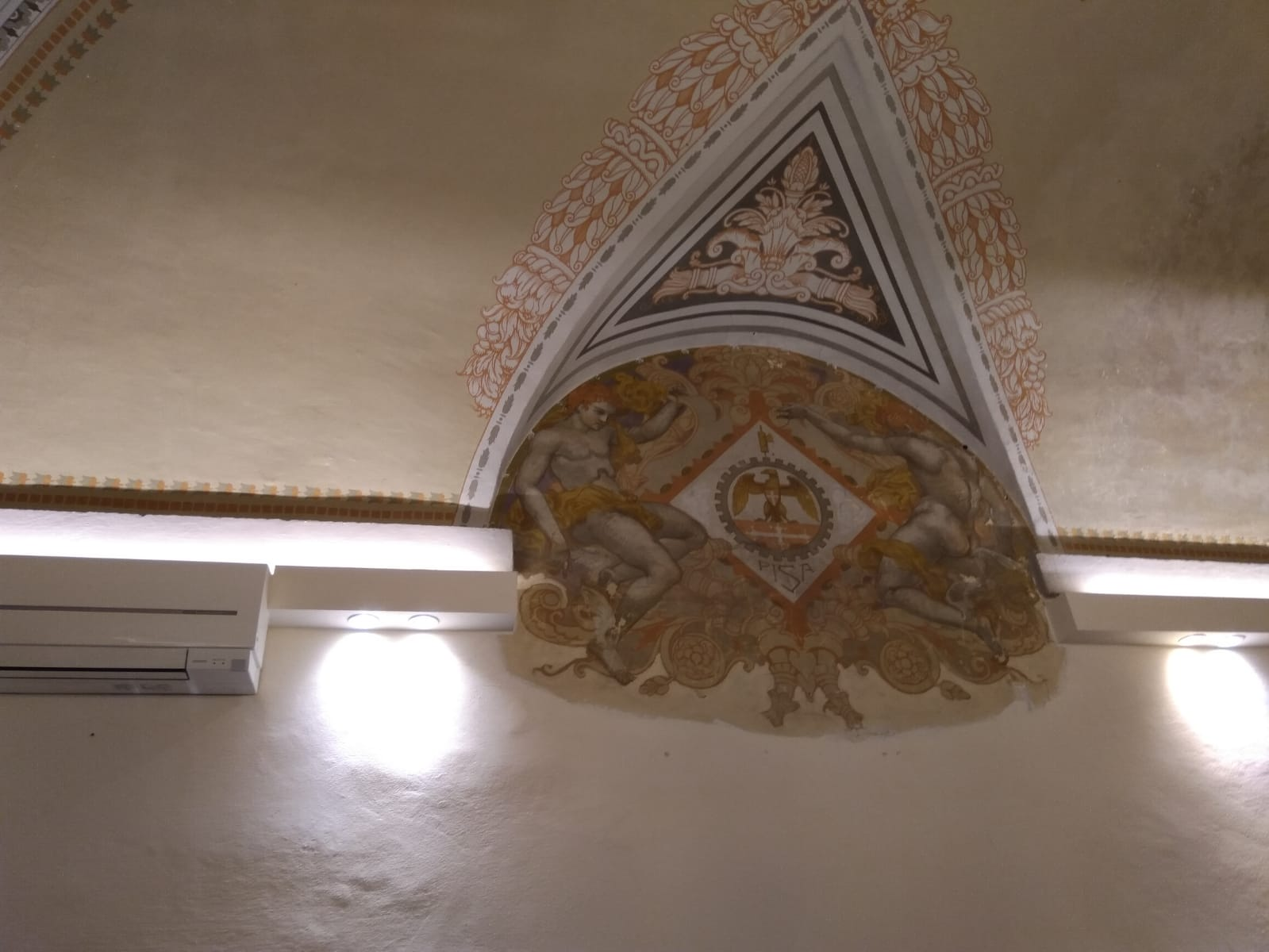 secondo affresco originale in quella che era la stalla